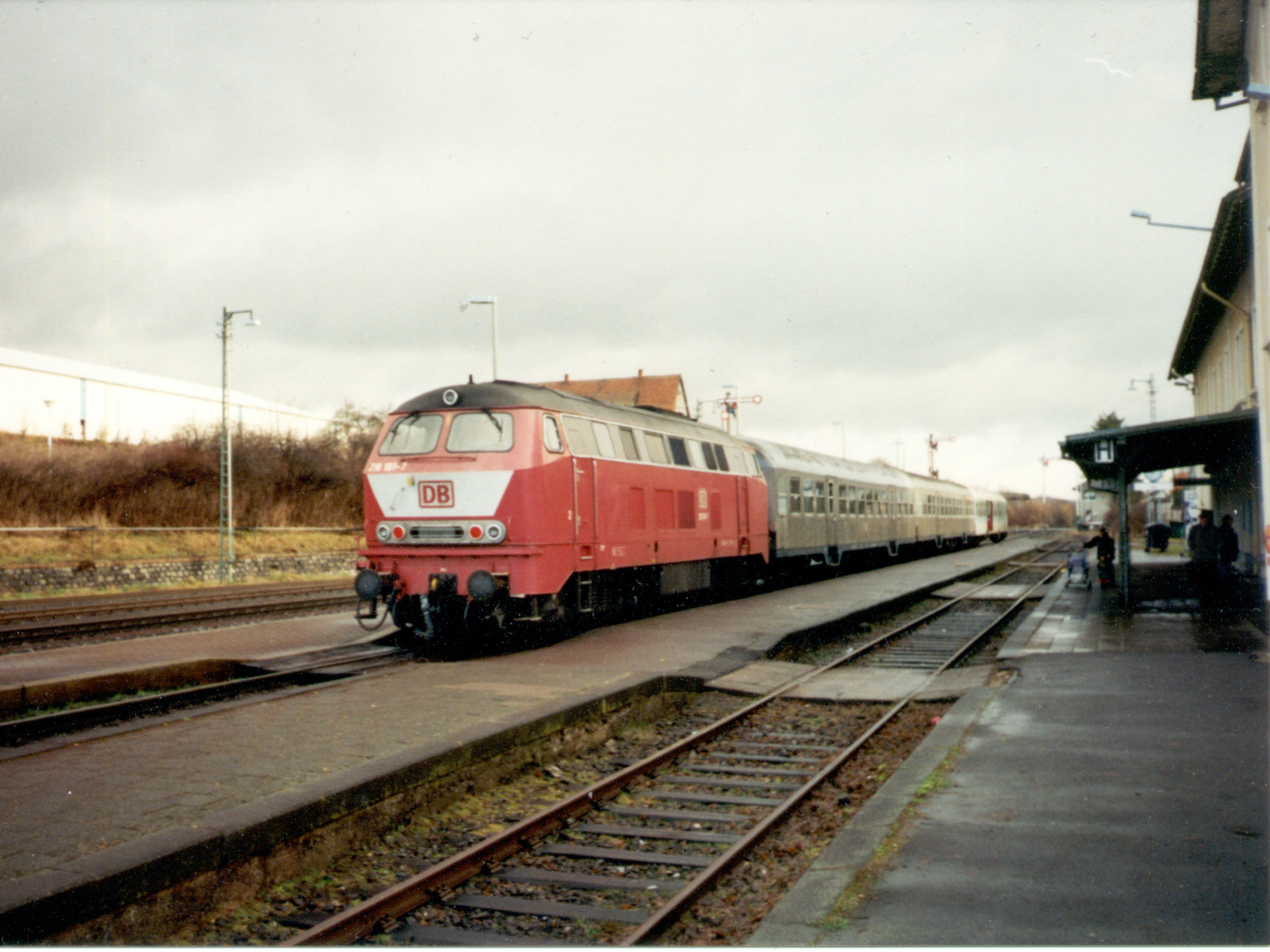 Die wendezugfähige 216 191 hat am 13. Dezember 1997 ihre RB 8409 von Gießen nach Lauterbach Nord geschoben und wartet hier nun auf ihre Folgeleistung.